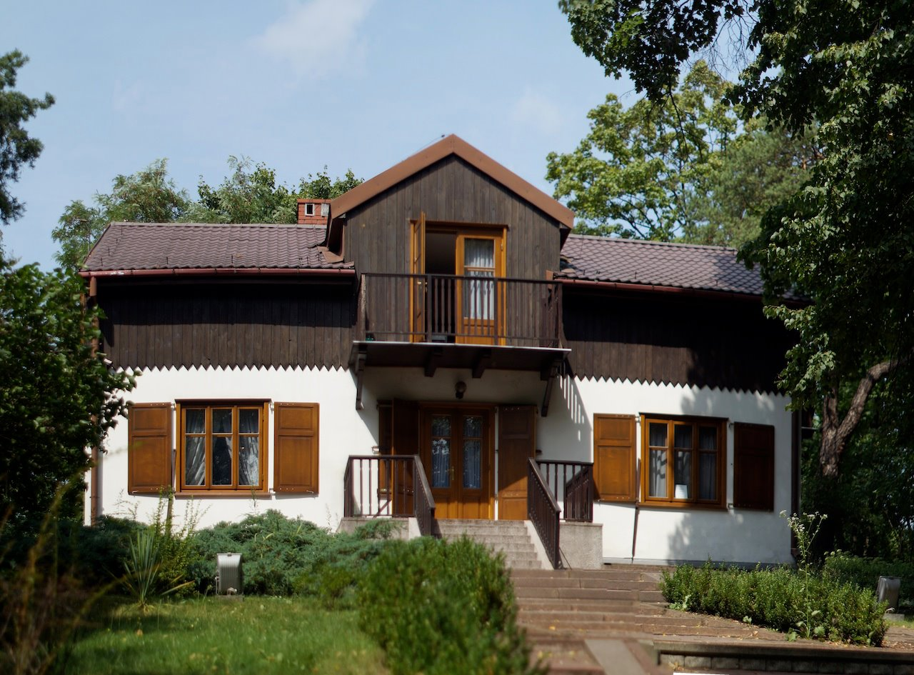 Widok na "Dom nad łąkami", czyli muzeum im. Zofii i Wacława Nałkowskich w Wołominie